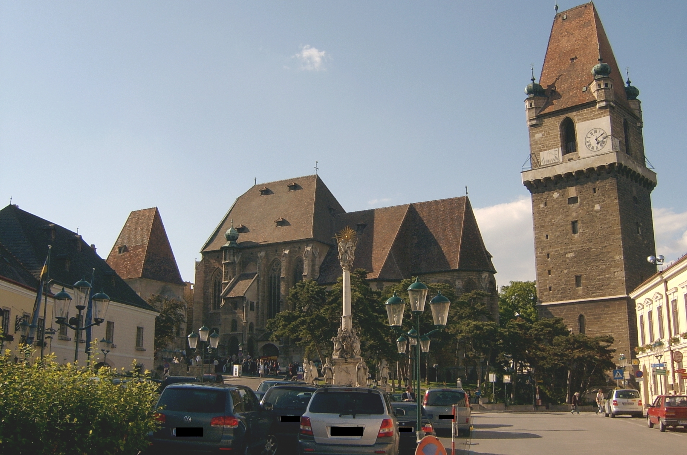 Tower, Church and castle left in the background in Perchtoldsdorf near Vienna in Lower Austria - Wehrturm, Pfarrkirche und links hinten die Burg in Perchtoldsdorf nahe Wien in Niederösterreich - Wehrturm